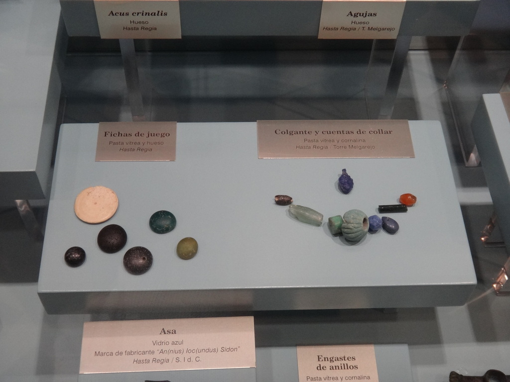 Museo Arqueológico de Jerez de la Frontera (Andalucía, España).